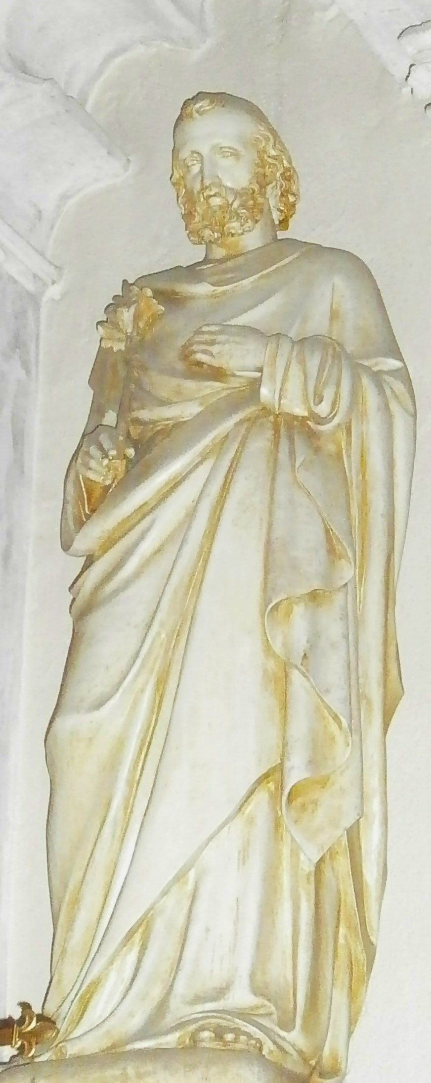 Annonay, statue "Saint Joseph", église Saint Joseph de Cance.